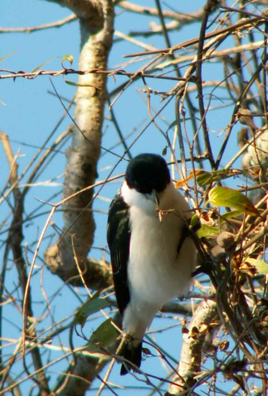 Artemie de Chabert